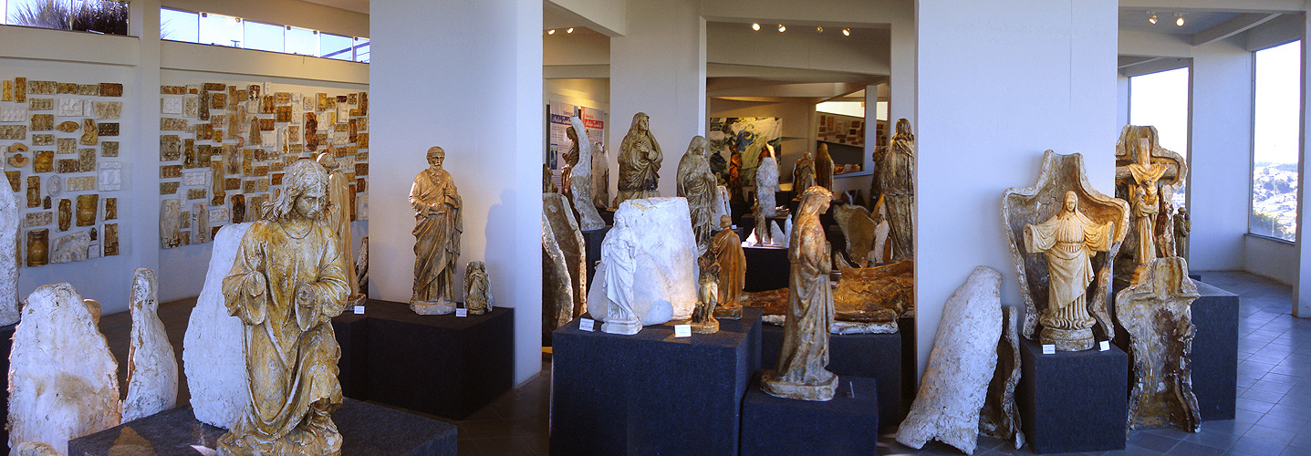 Interior do Memorial Atelier Zambelli, Caxias do Sul, Brasil.